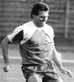 Title: FC Rot-Weiß Erfurt - FC Sachsen Leipzig 0:1 Factual corrections and alternative descriptions are encouraged separately from the original description. Additionally errors can be reported at this page to inform the Bundesarchiv. Original historic description: ADN-Ralf Hirschberger-14.9.90-Erfurt: FC Rot-Weiß Erfurt - FC Sachsen Leipzig 0:1 (0:0) Kein gutes, aber ein hochdramatisches Spiel bot die Begegnung im Dimitroff-Stadion. Hier versucht sich der Leipziger Weitze (r) gegen die Erfurter Romstedt (stehend) und Räthe.